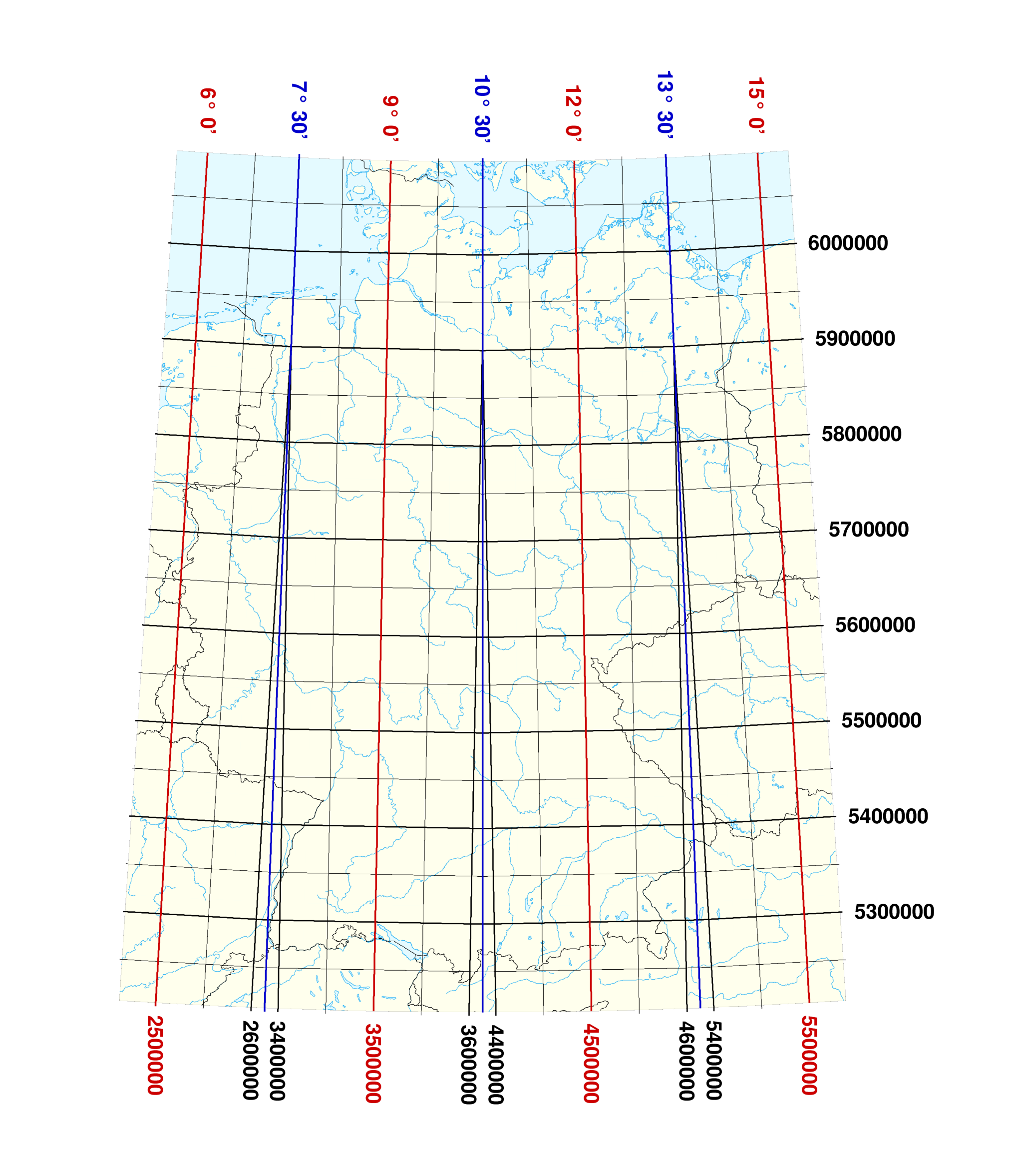 Gauß-Krüger-Raster Rasterabstand 50 km Rechts- und Hochwerte in Meter Transversale-Mercator-Kartenprojektion